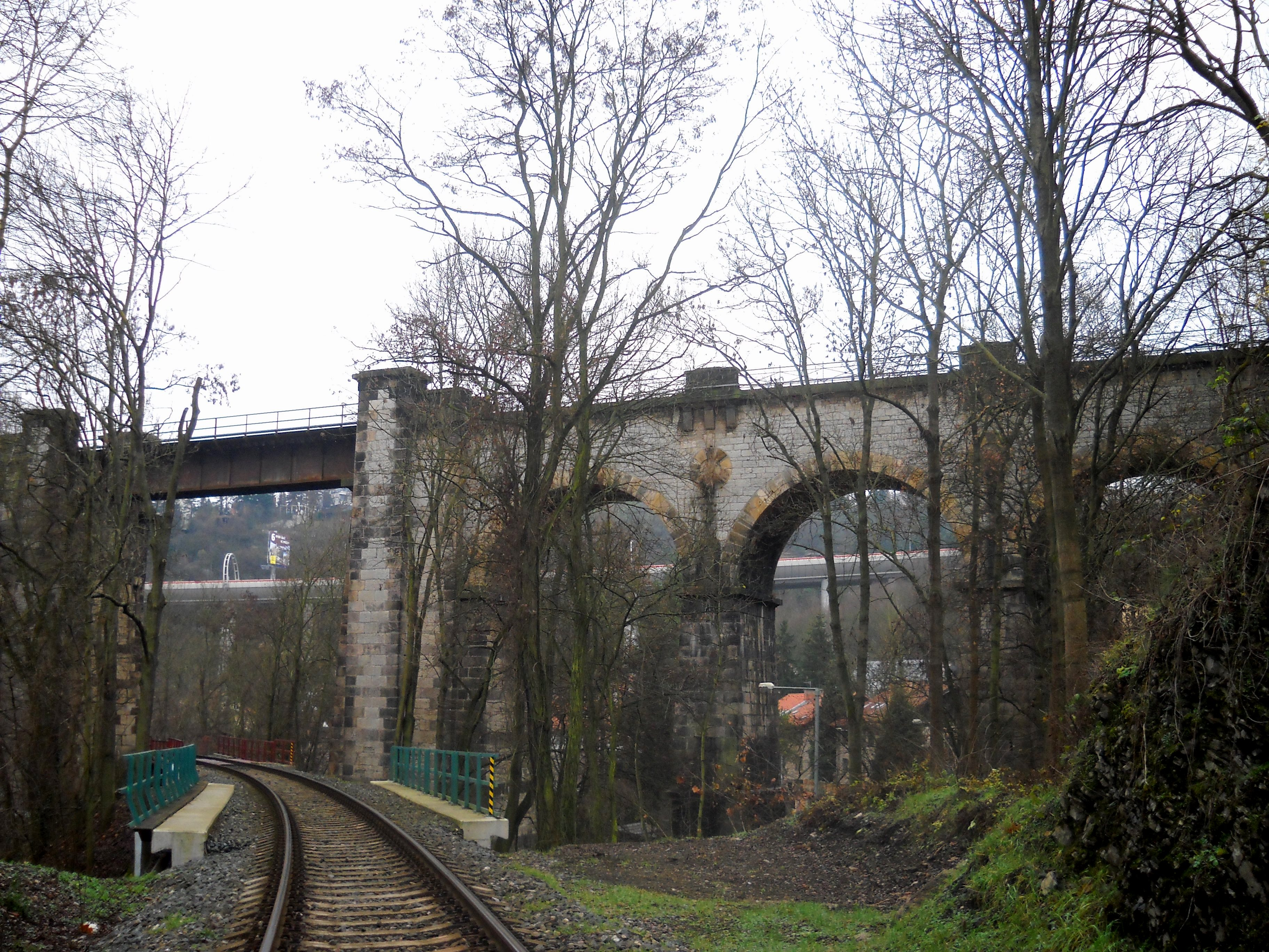 Praha-Hlubočepy. Pohled z přírodní památky Železniční zářez na křížení tratí a tzv. Pražský Semmering